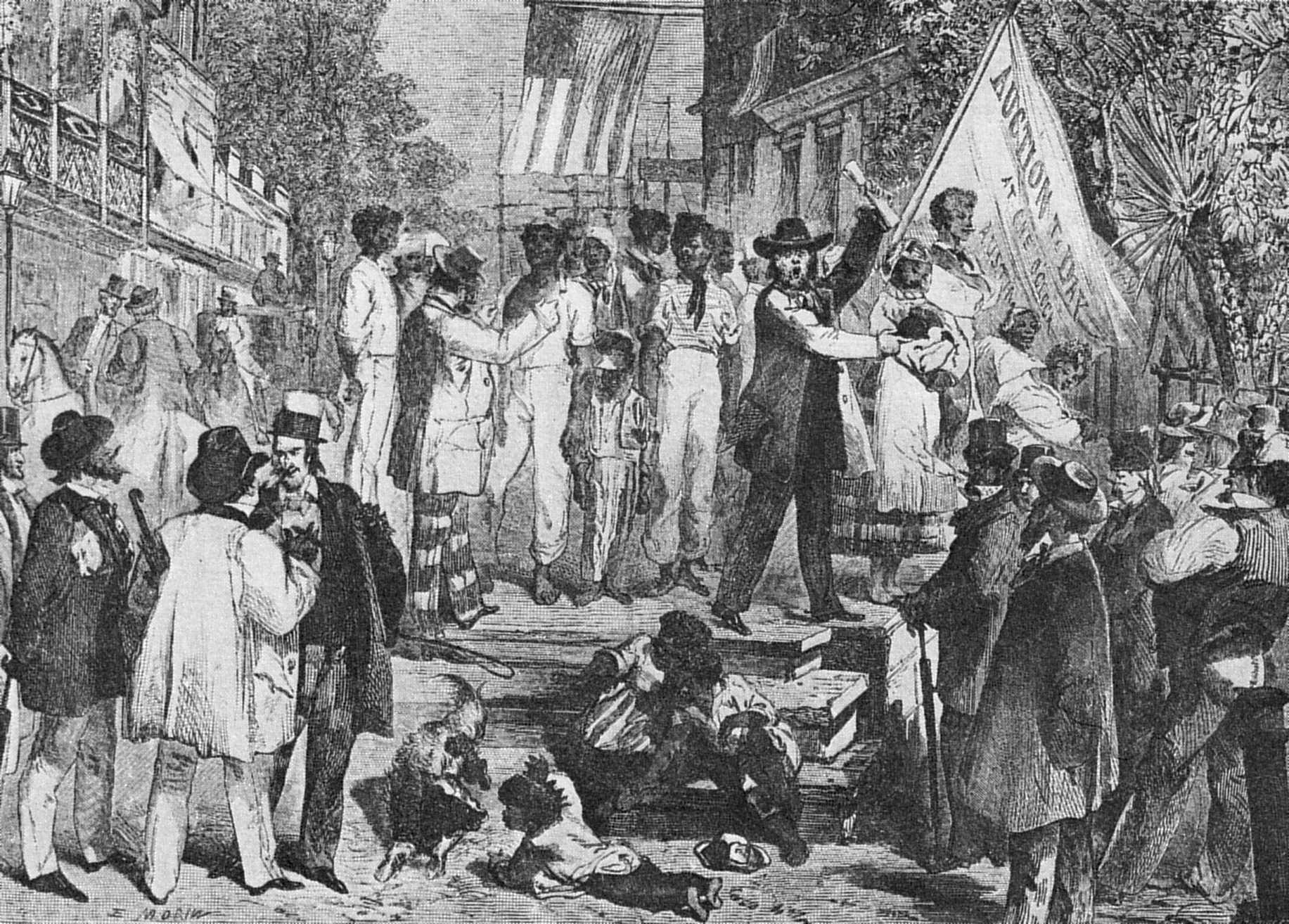 Sklavenmarkt_in_Richmond_Virginia_USA-Holzschnitt_1861